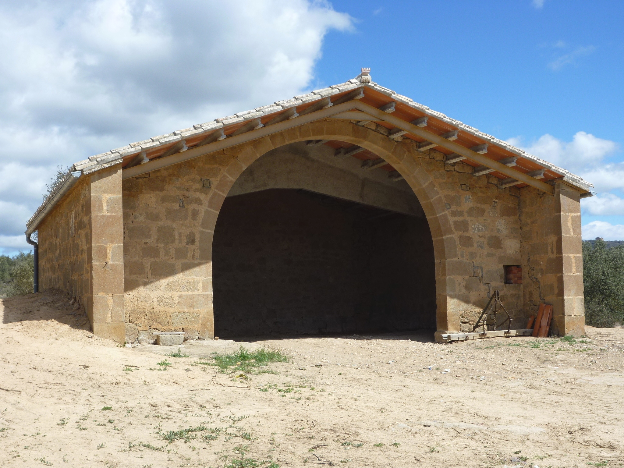 Coscó (Biosca): nova pallera